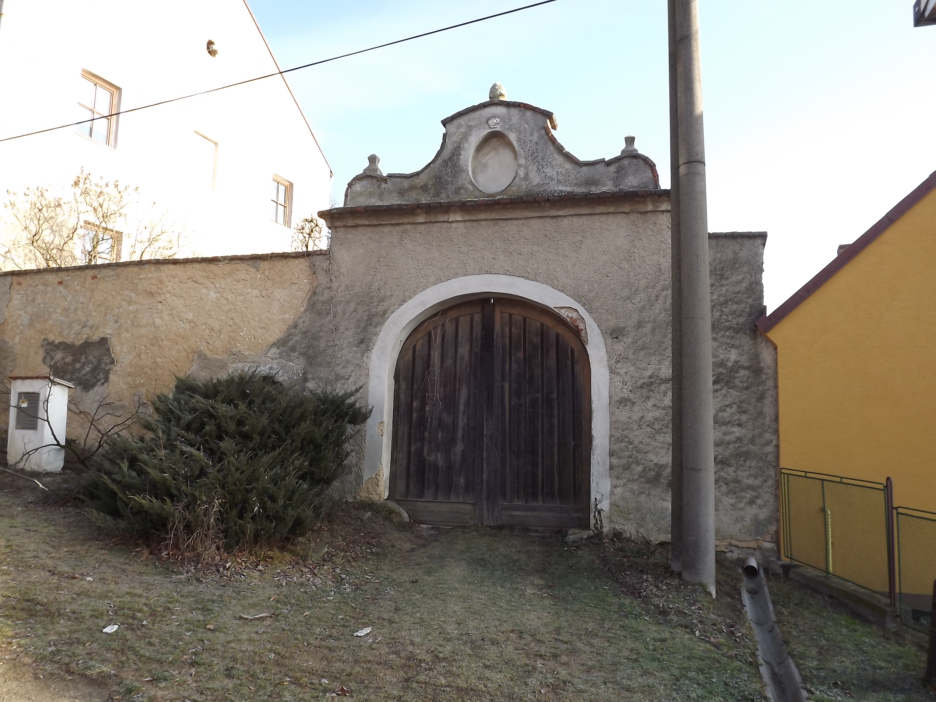 Fara, z toho jen: brána a branka (Staré Hobzí), při JZ nároží fary čp. 31 31, Staré Hobzí